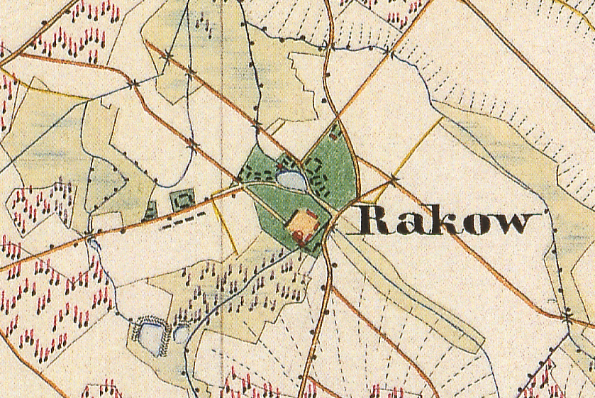 Raakow, Wohnplatz der Stadt Drebkau, Lkr. Spree-Neiße, Brandenburg, Ausschnitt aus dem Urmesstischblatt 4351 Drebkau von 1846